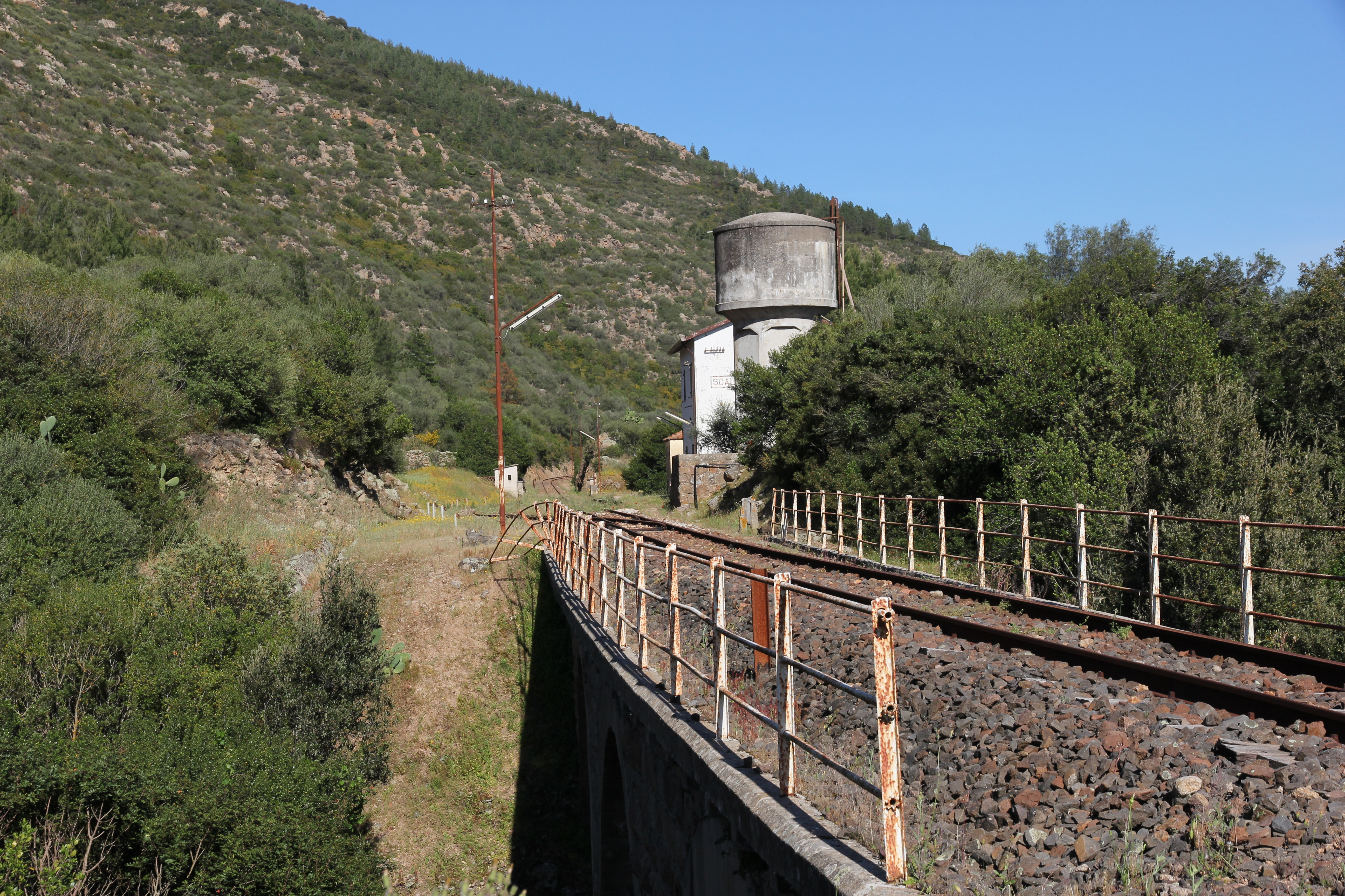 Bortigiadas, stazione ferroviaria di Scala Ruia - Ferrovia Sassari-Tempio-Palau